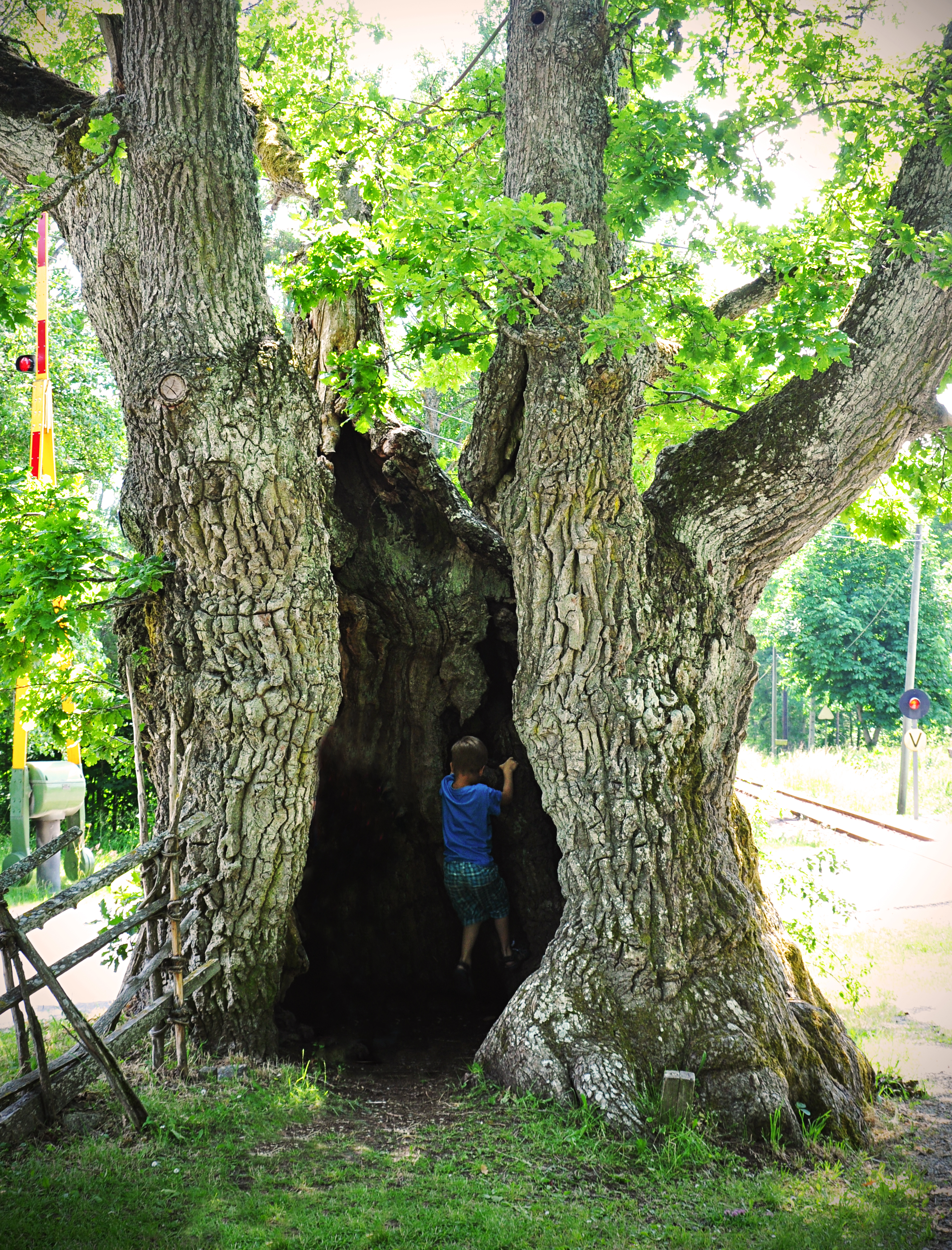 Eken hållplats utmed museijärnvägen Gotlands Hesselby Jernväg. Eken har fått sitt utseende efter ett blixtnedslag.